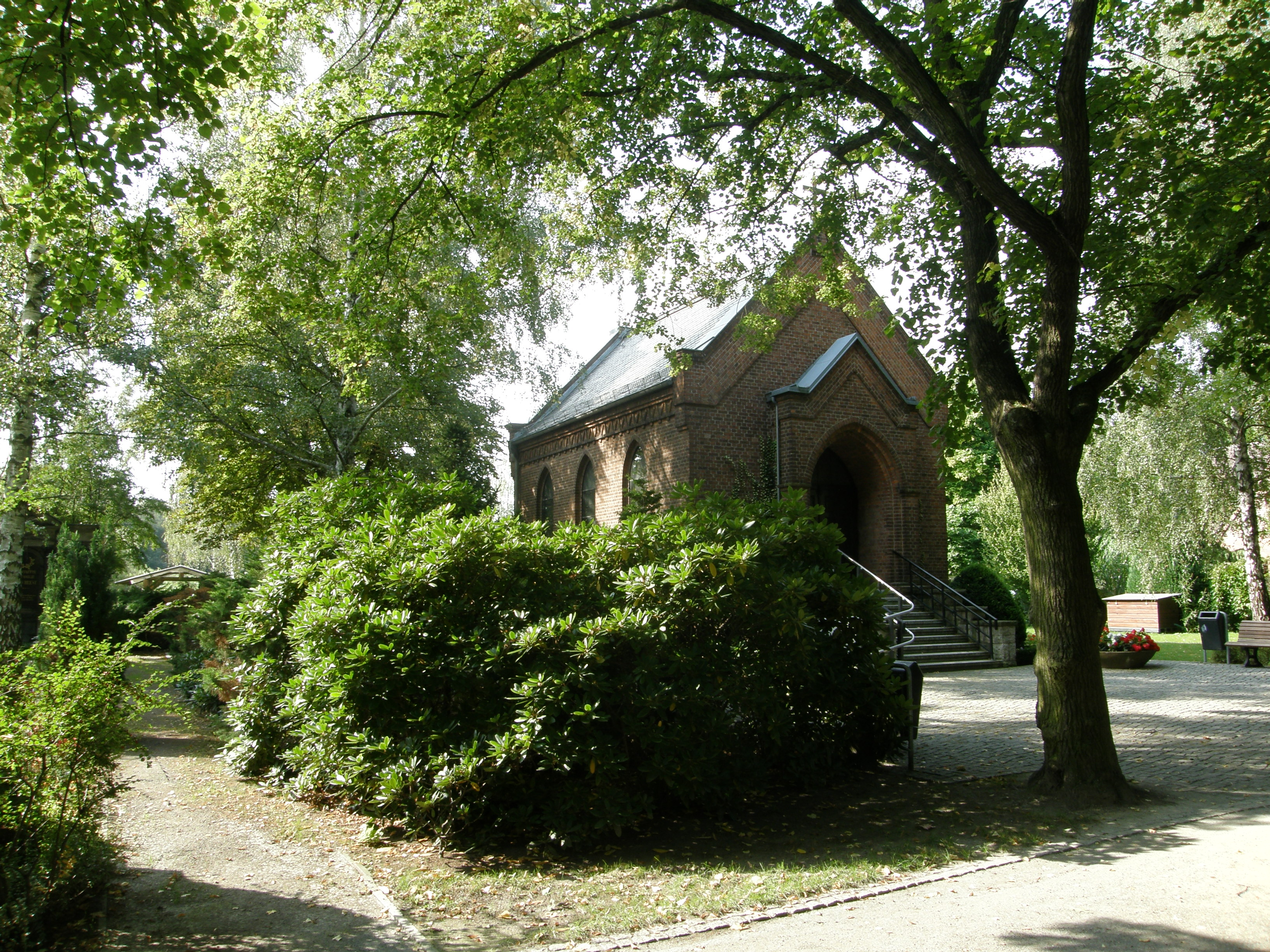 Berlin-Biesdorf, Kapelle